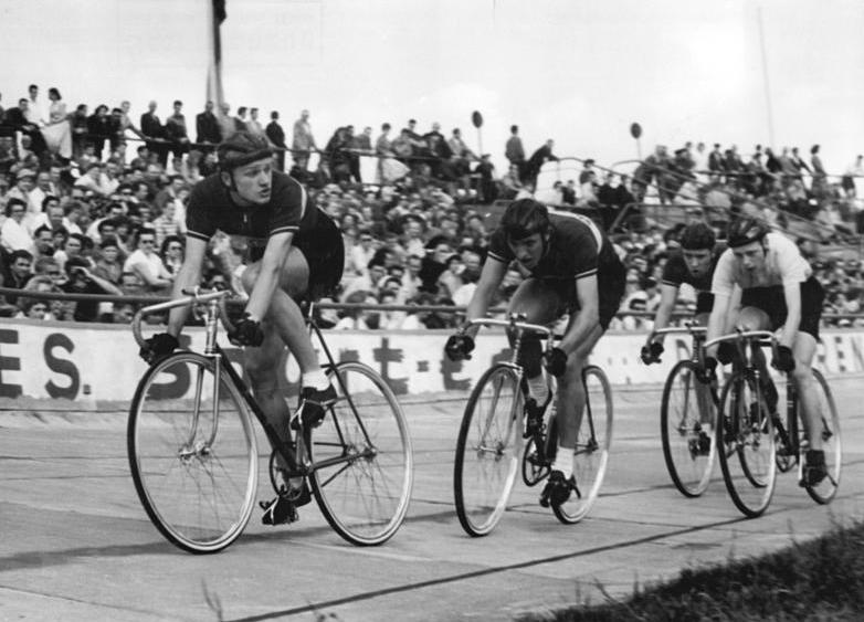 Huschke, Alex Fässler, S. Fässler, Loth Zentralbild Wen-Bey 1.6.1958 Bey-L Berliner Meisterschaft der Bahnfahrer Am Sonntag, dem 1.6.1958 wurde auf der Radrennbahn in Berlin-Weißensee die Berliner Bahnmeisterschaften entschieden. UBz: Während der Berliner Meisterschaft der Jugend über 10 km. Huschke führt vor Alex Fässler, dem späteren Sieger Siegfried Fässler (halb verdeckt) und Loth (von links nach rechts).